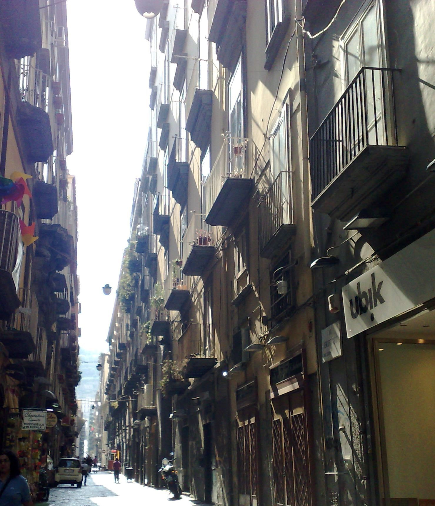 Facciata del palazzo Venezia di Napoli